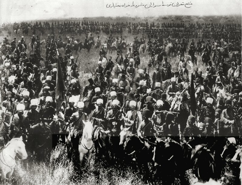 Bakhtiaris in tehran